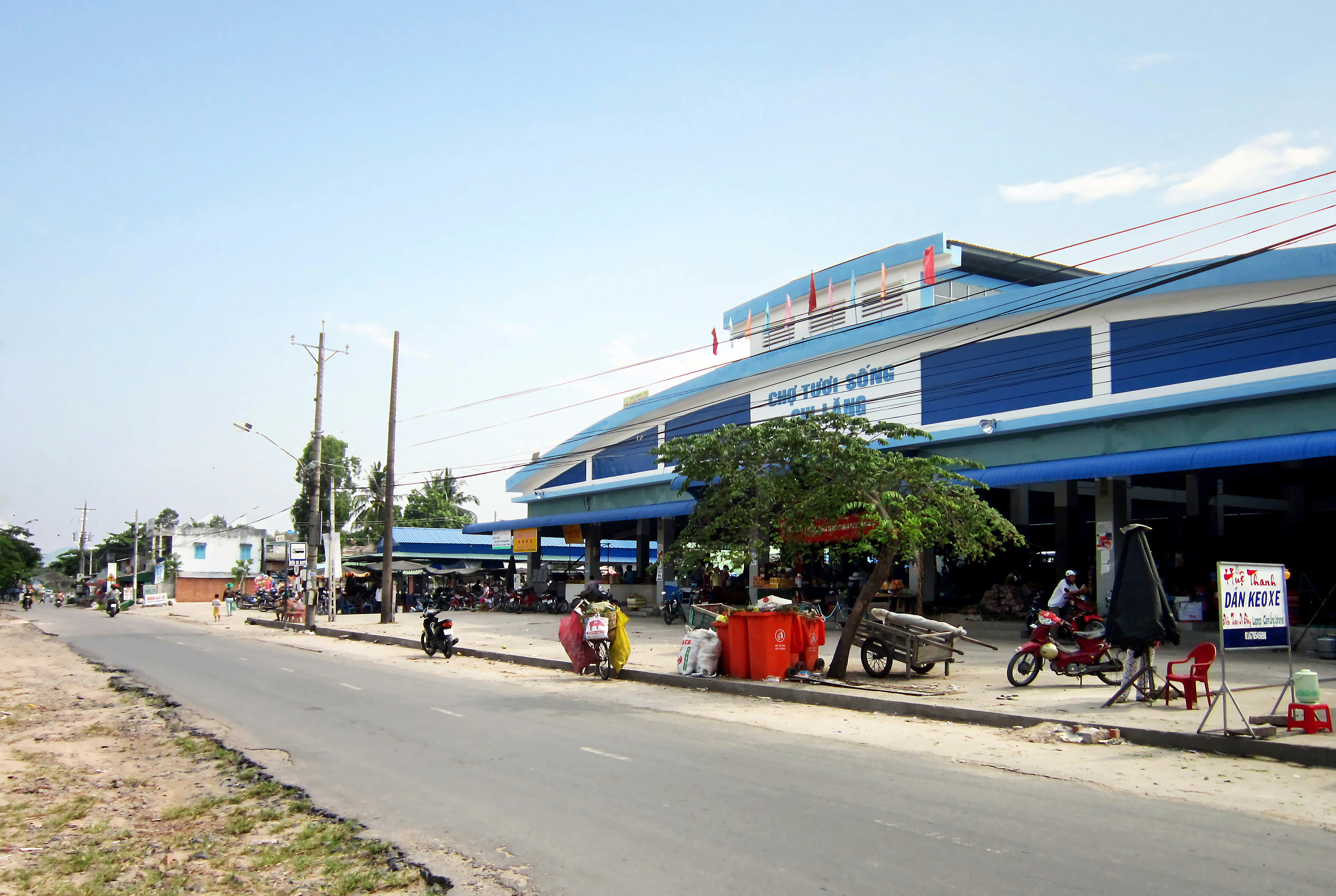 Chợ Chi Lăng (khu 1) nằm bên tỉnh lộ 91B, ở thị trấn Chi Lăng, huyện Tịnh Biên, An Giang, Việt Nam.